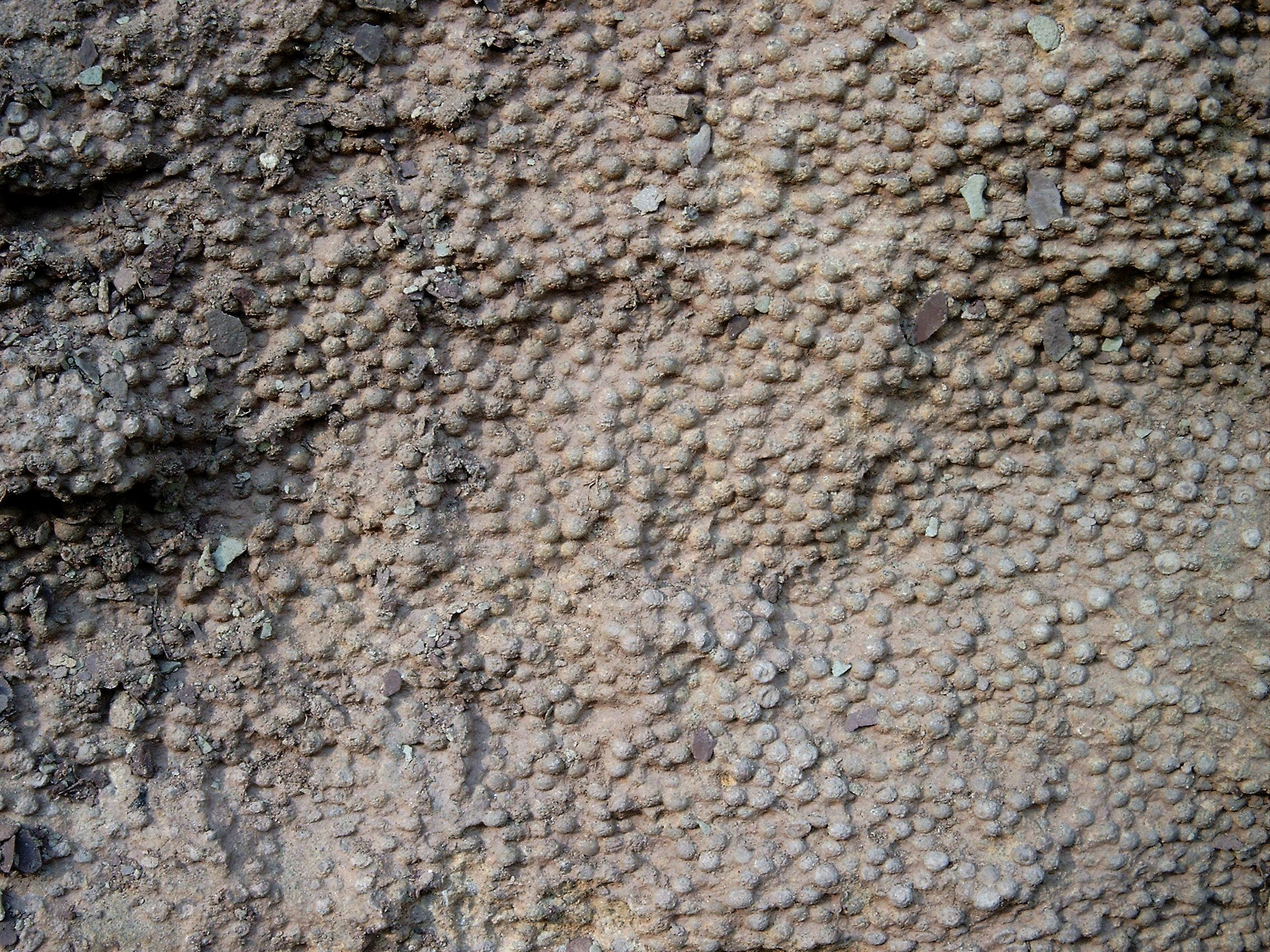 Rogenstein, anstehend im Steinbruch Heeseberg, Landkreis Helmstedt, Unterer Buntsandstein